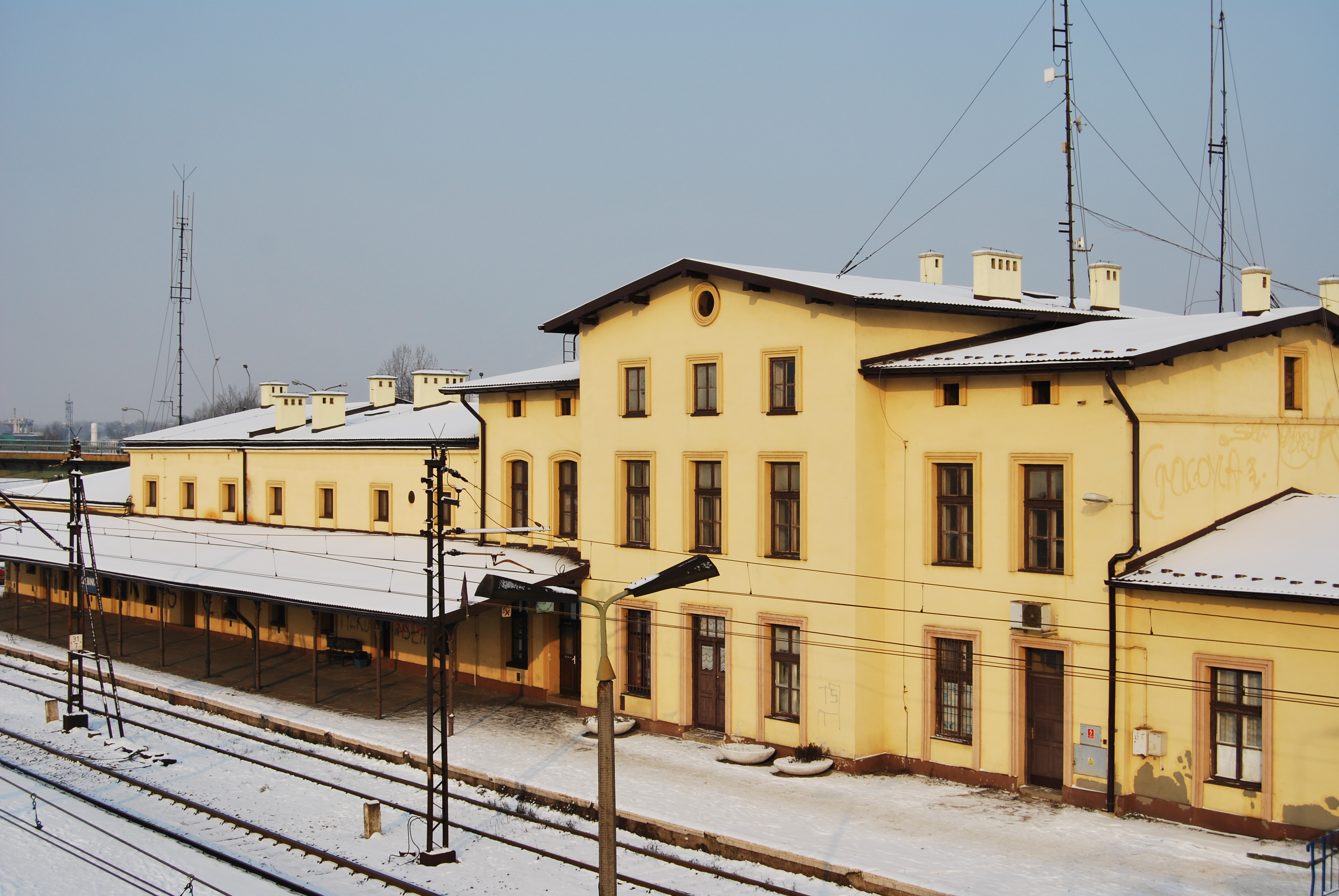 Trzebinia; Dworzec PKP (2009)